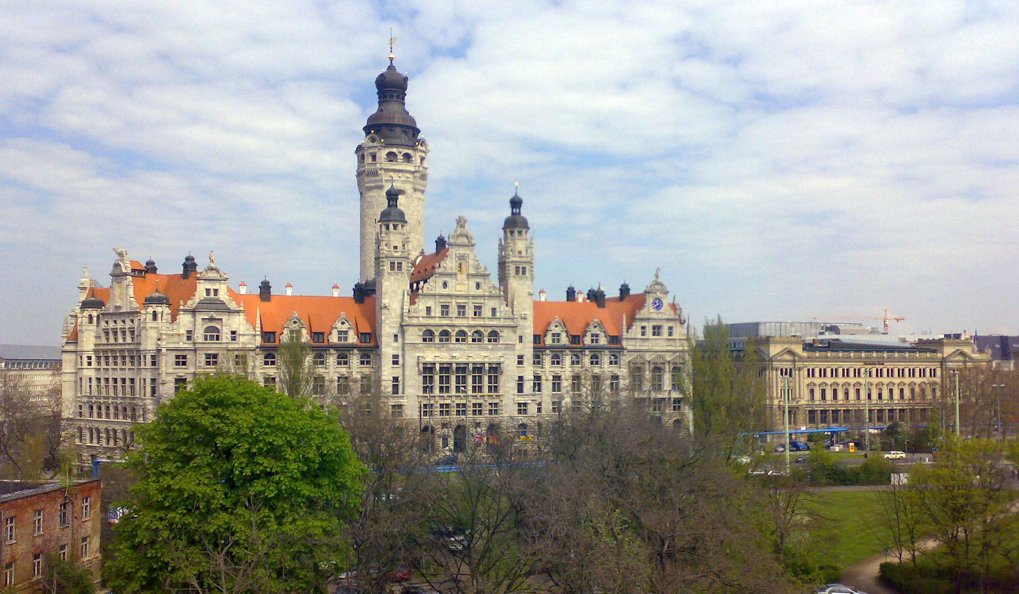 Neues Rathaus (Leipzig), fotografiert aus Süden im April, rechts daneben das Gebäude der Deutschen Bank